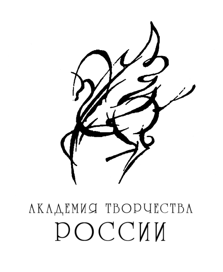 АКАДЕМИЯ ТВОРЧЕСТВА РОССИИ. 1990 г